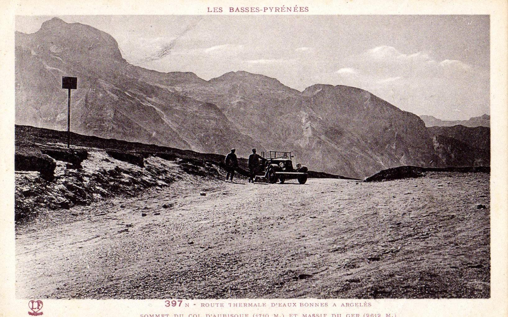 Vue de la route thermale au col d'Aubisque, Pyrénées-Atlantiques, France.